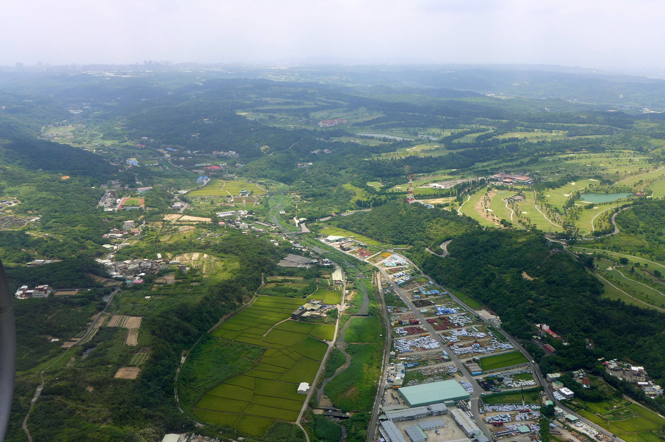 Linkou District